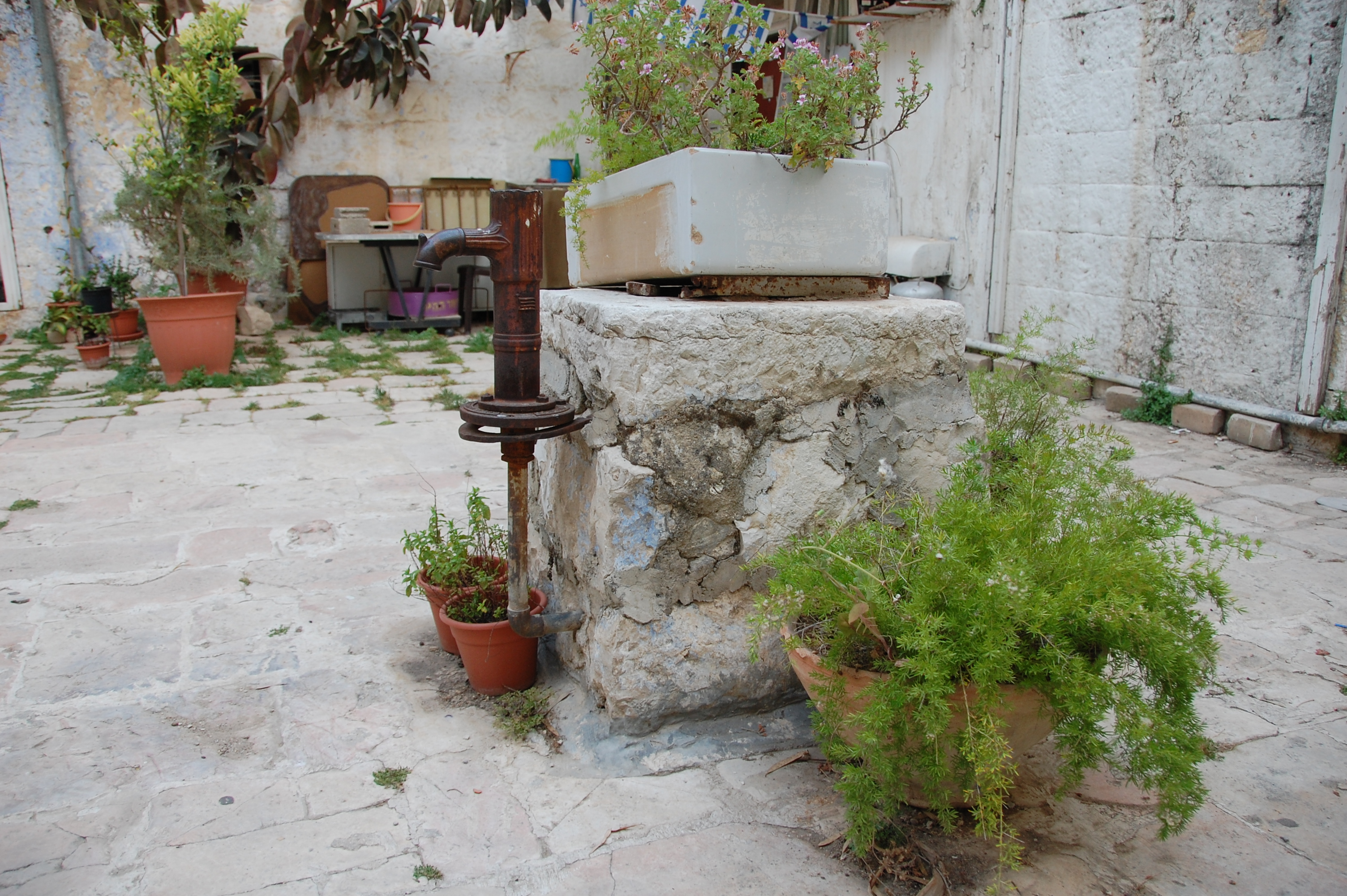 beit david, jerusalem